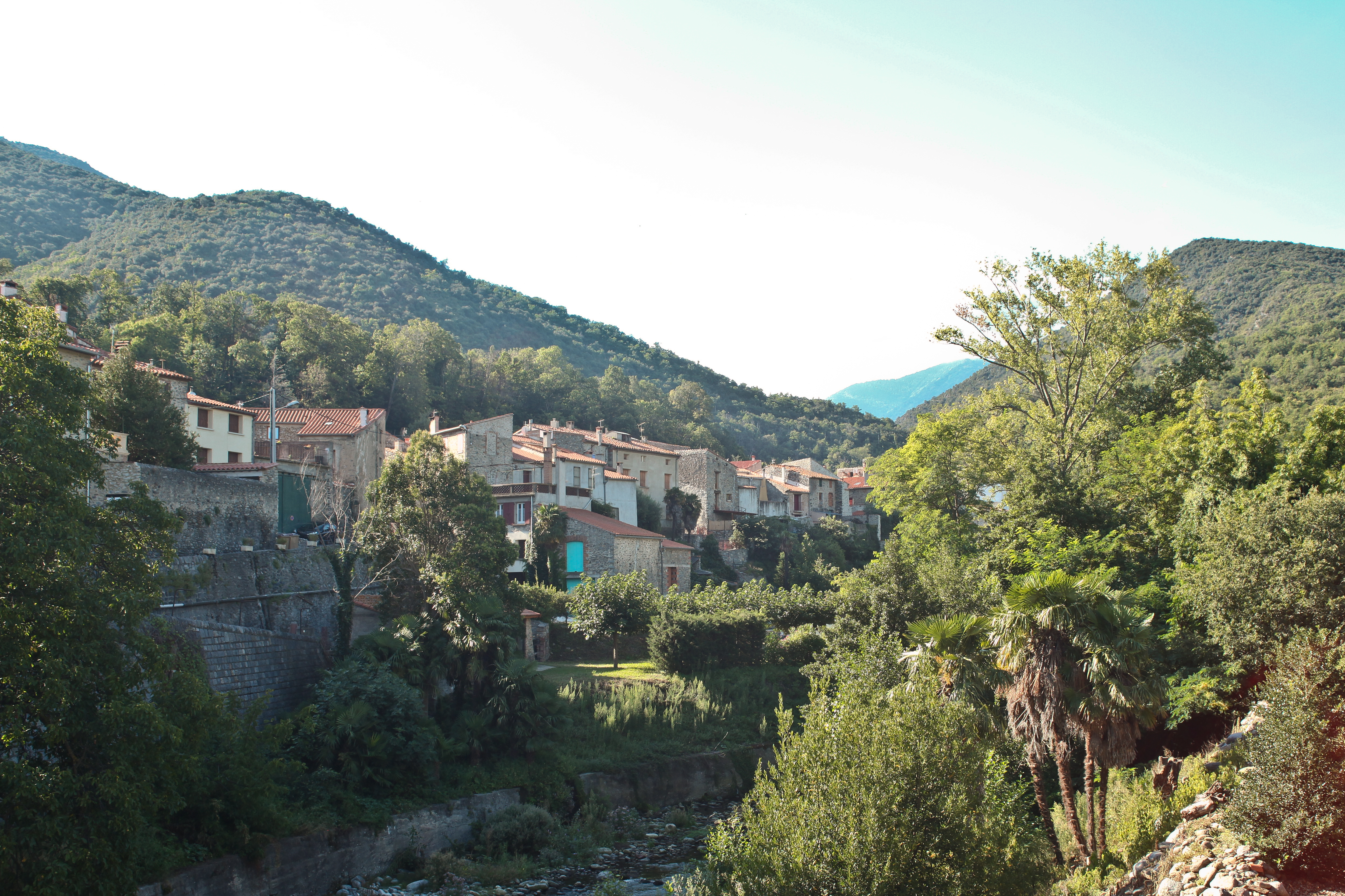 Village de Finestret